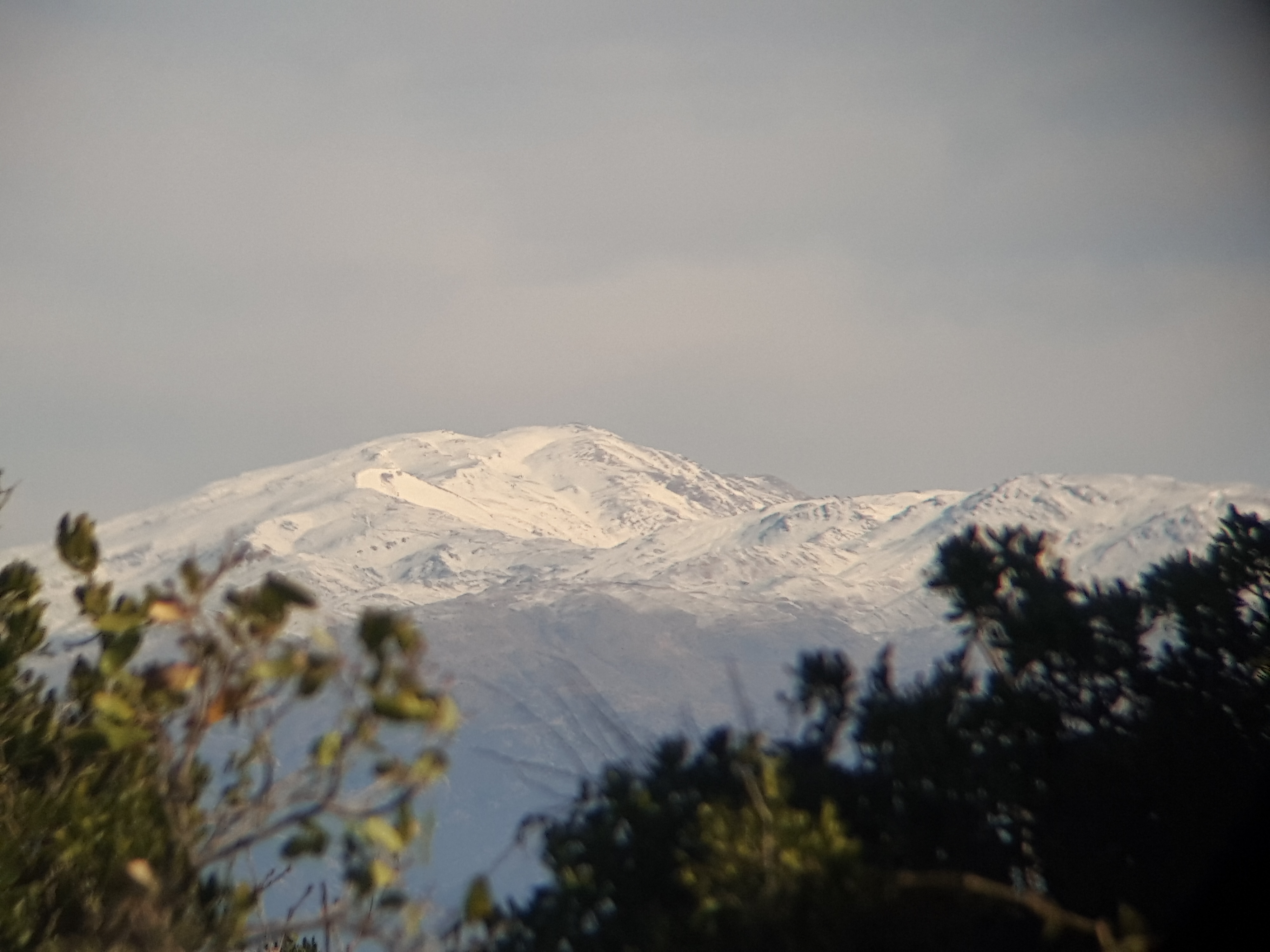 הר החרמון , כפי שנראה מהר מירון דרך משקפת 10X50 (דצמבר 2017)